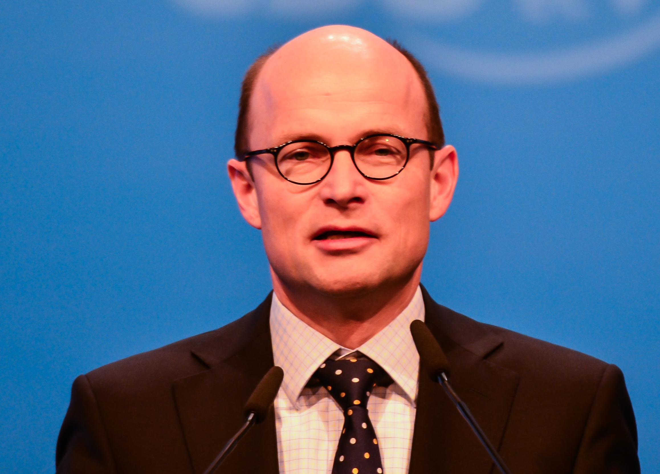 CSU Parteitag 2013 am 23.11.2013 in München